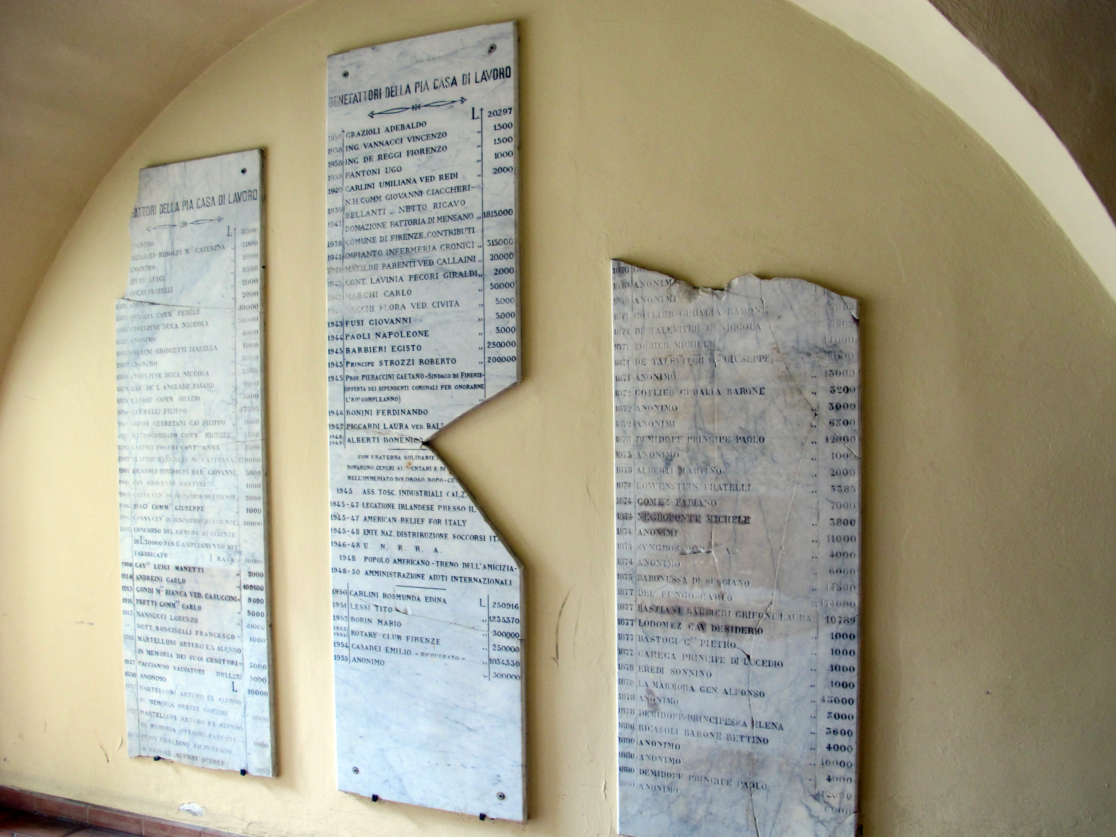 Montedomini, targa benefattori 2